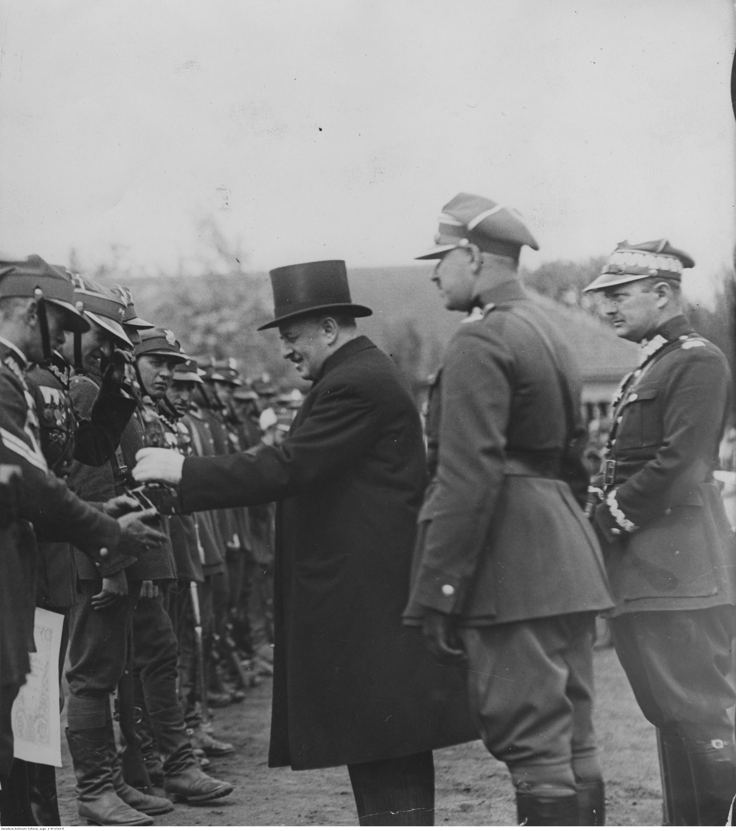 Święto 5 Batalionu Saperów w Krakowie. Minister Ignacy Boerner wręcza nagrody. Widoczny także m.in. gen. Mieczysław Smorawiński (z prawej). Koncern Ilustrowany Kurier Codzienny - Archiwum Ilustracji. Sygnatura: 1-W-1714-5